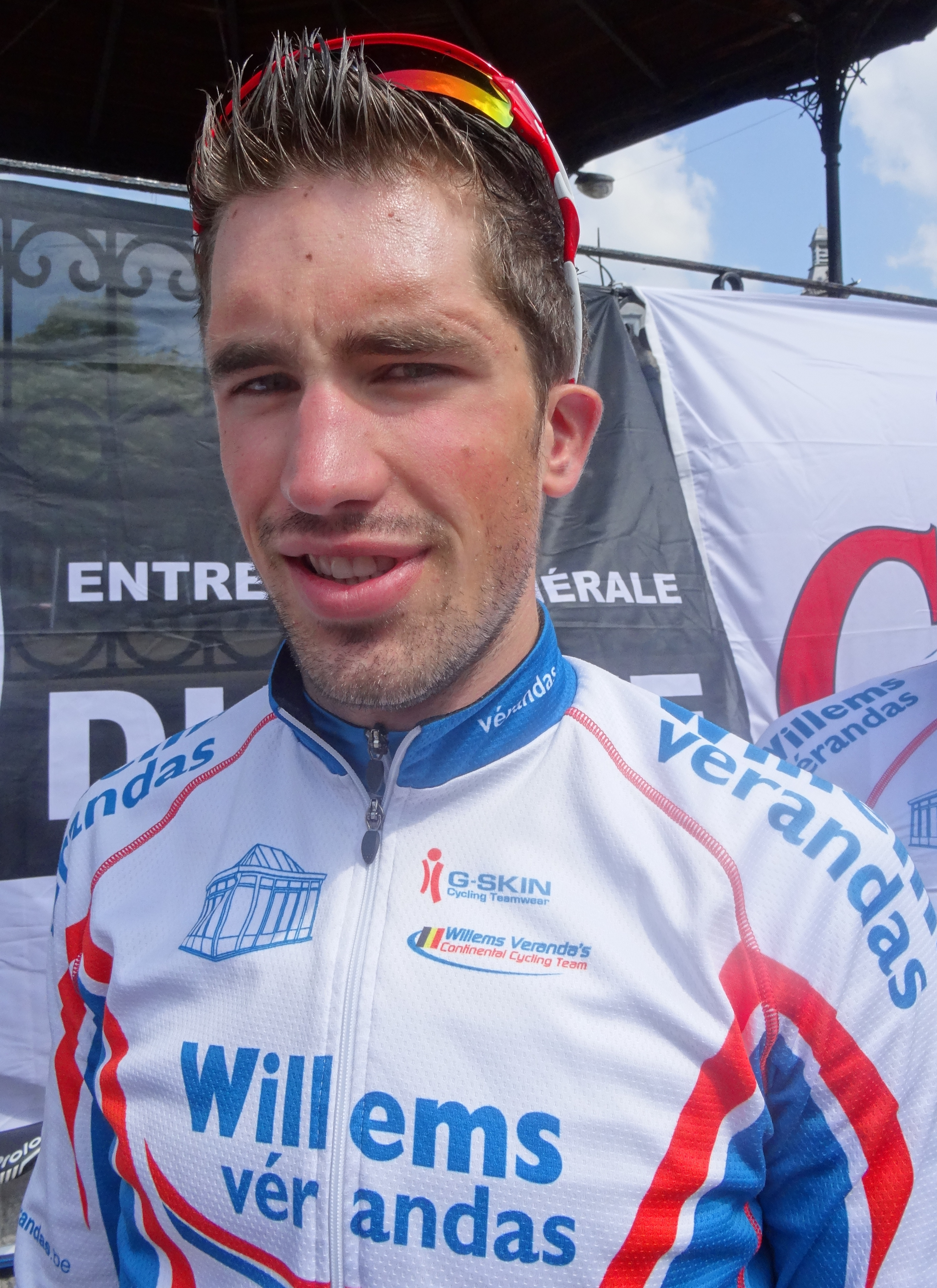 Reportage réalisé le samedi 17 mai à l'occasion du départ du Grand Prix Criquielion 2014 à Boussu, Belgique.